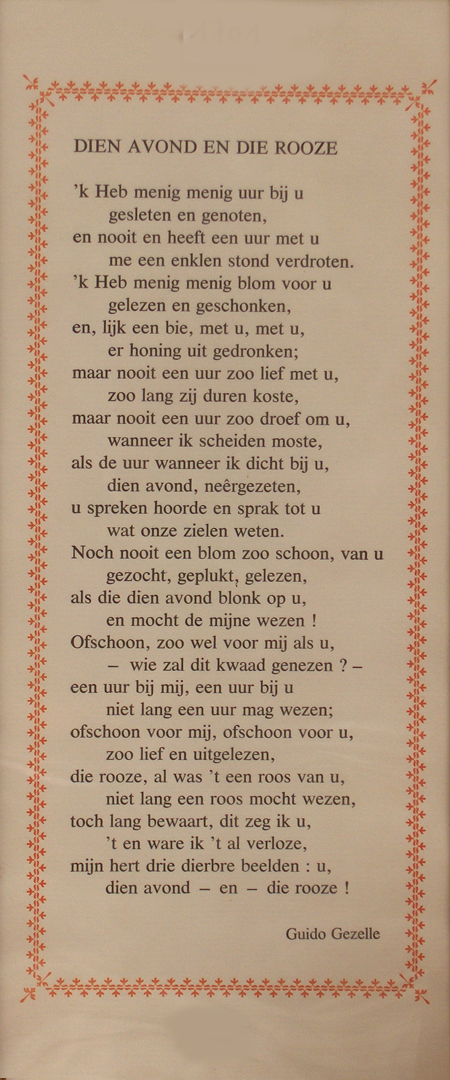 "Dien avond en die roze", gedicht door Guido Gezelle (1830-1899)